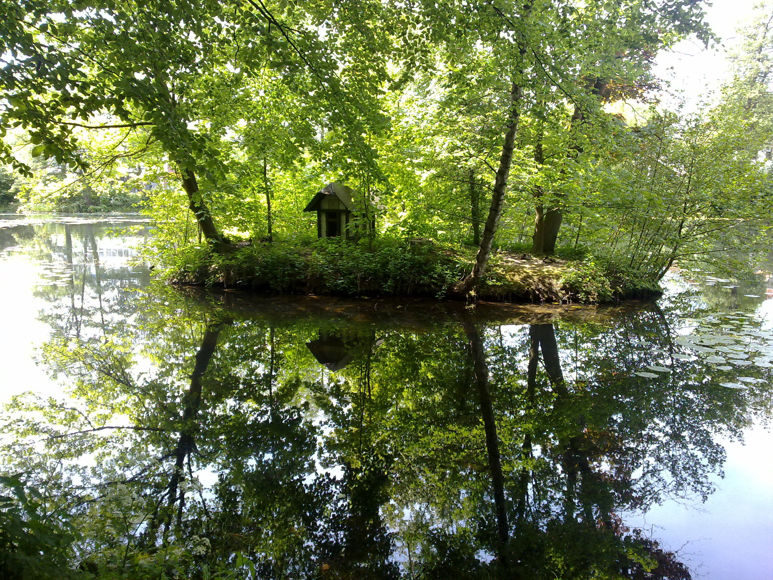 „Mühlenteich“ Ibbenbüren, westlich des Aasees